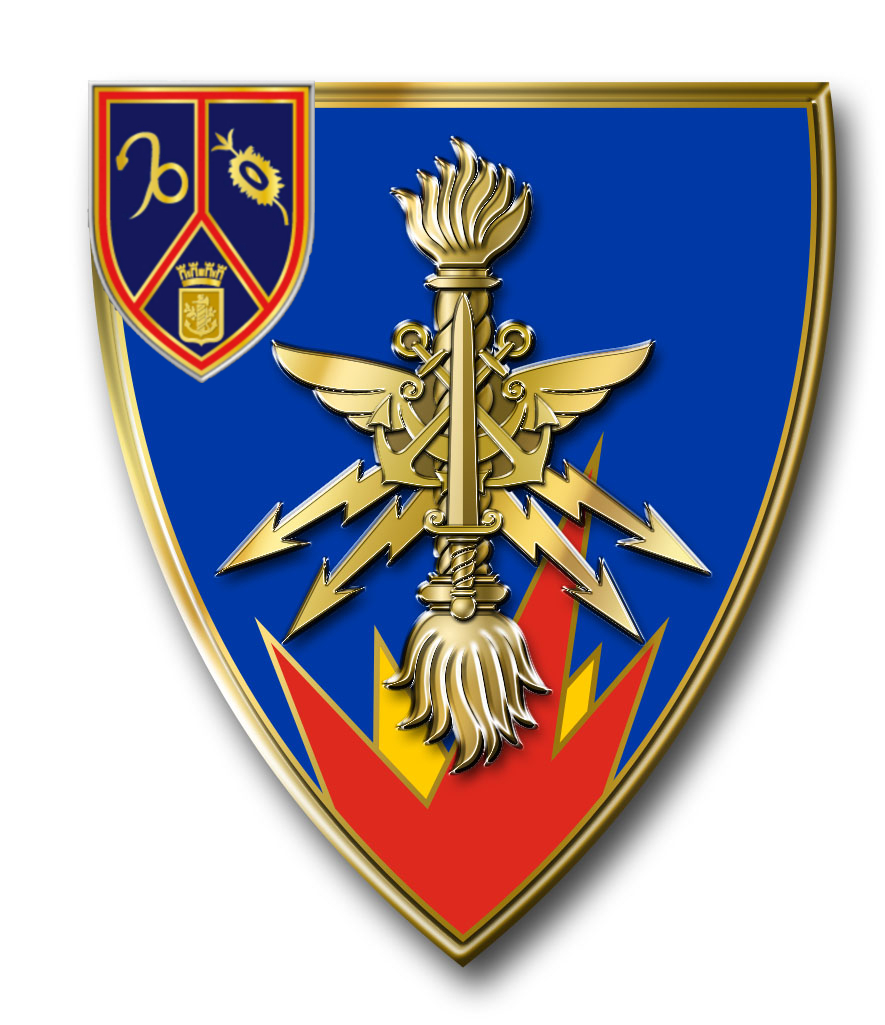 Insigne GMu Martinique